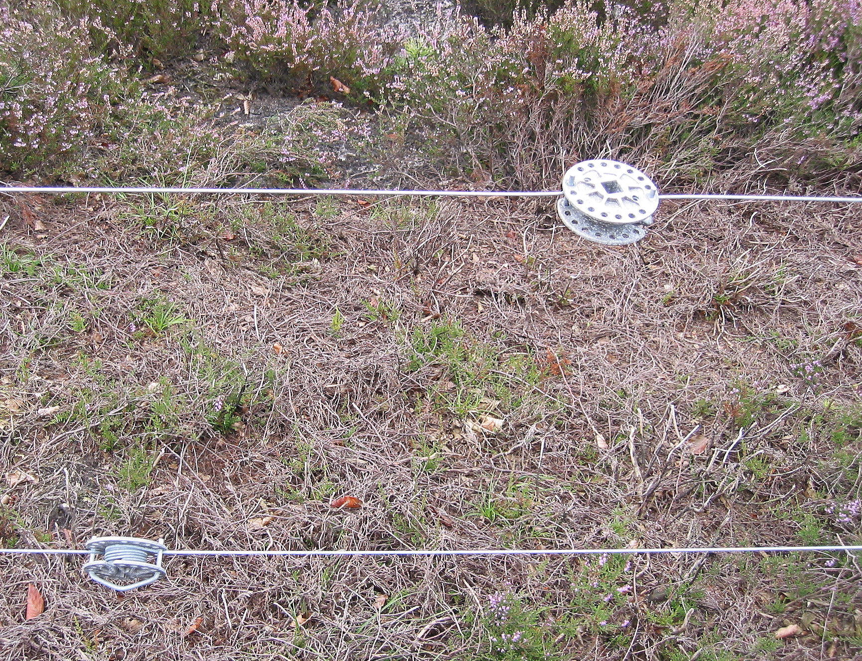 Draadspanner